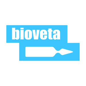 Logo společnosti